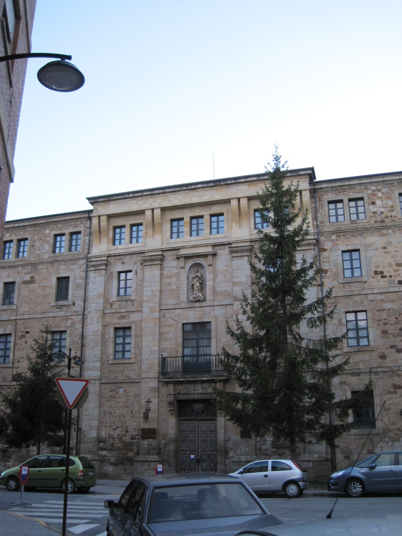 Vista parcial de la fachada del Seminario de Astorga (León, España).